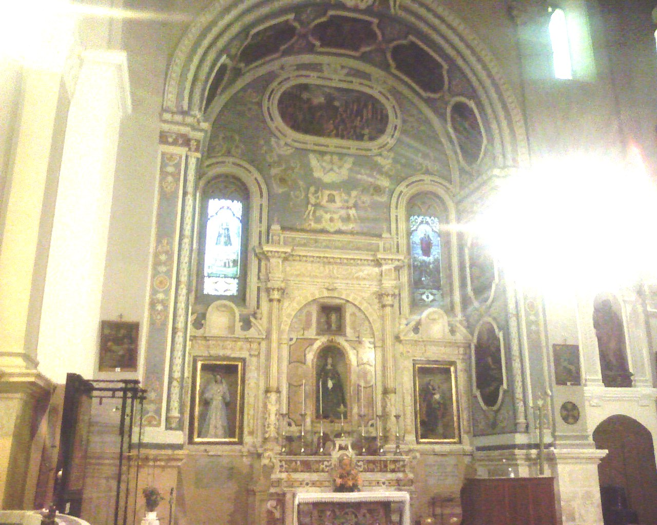 Chiesa Maria Santissima Annunziata - Modugno (Bari) - Italy